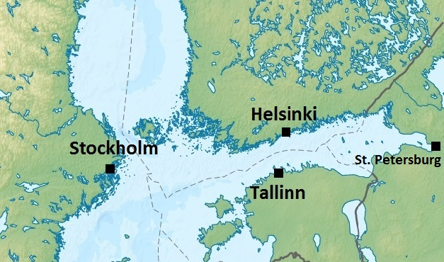 Byer i Finskebukta